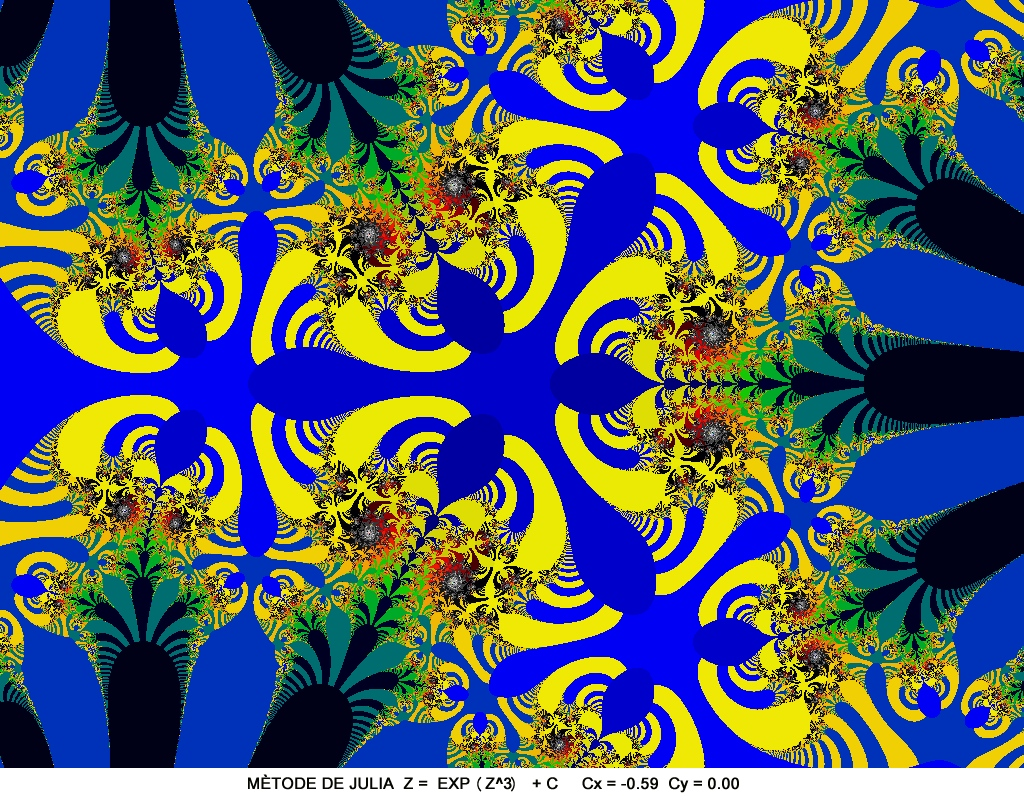 Julia set for f ( z ) = e z 3 − 0.59 {\displaystyle f(z)=e^{z^{3 -0.59}